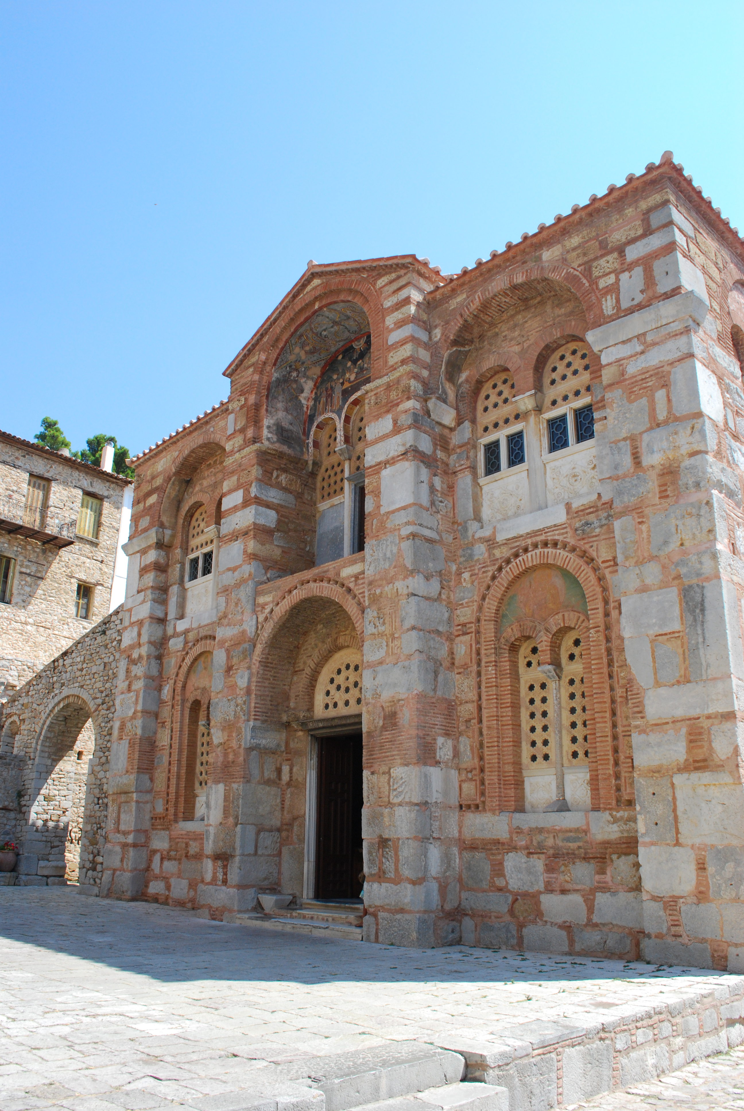 Vue du monastère de Hosios Loukas, en Béotie.